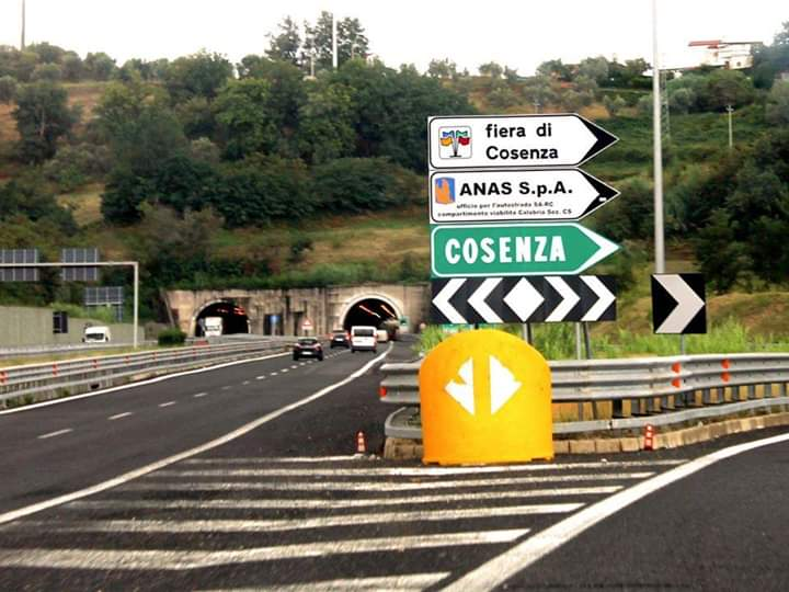 Svincola autostradale di Cosenza Sud dell'autostrada A2 del Mediterraneo